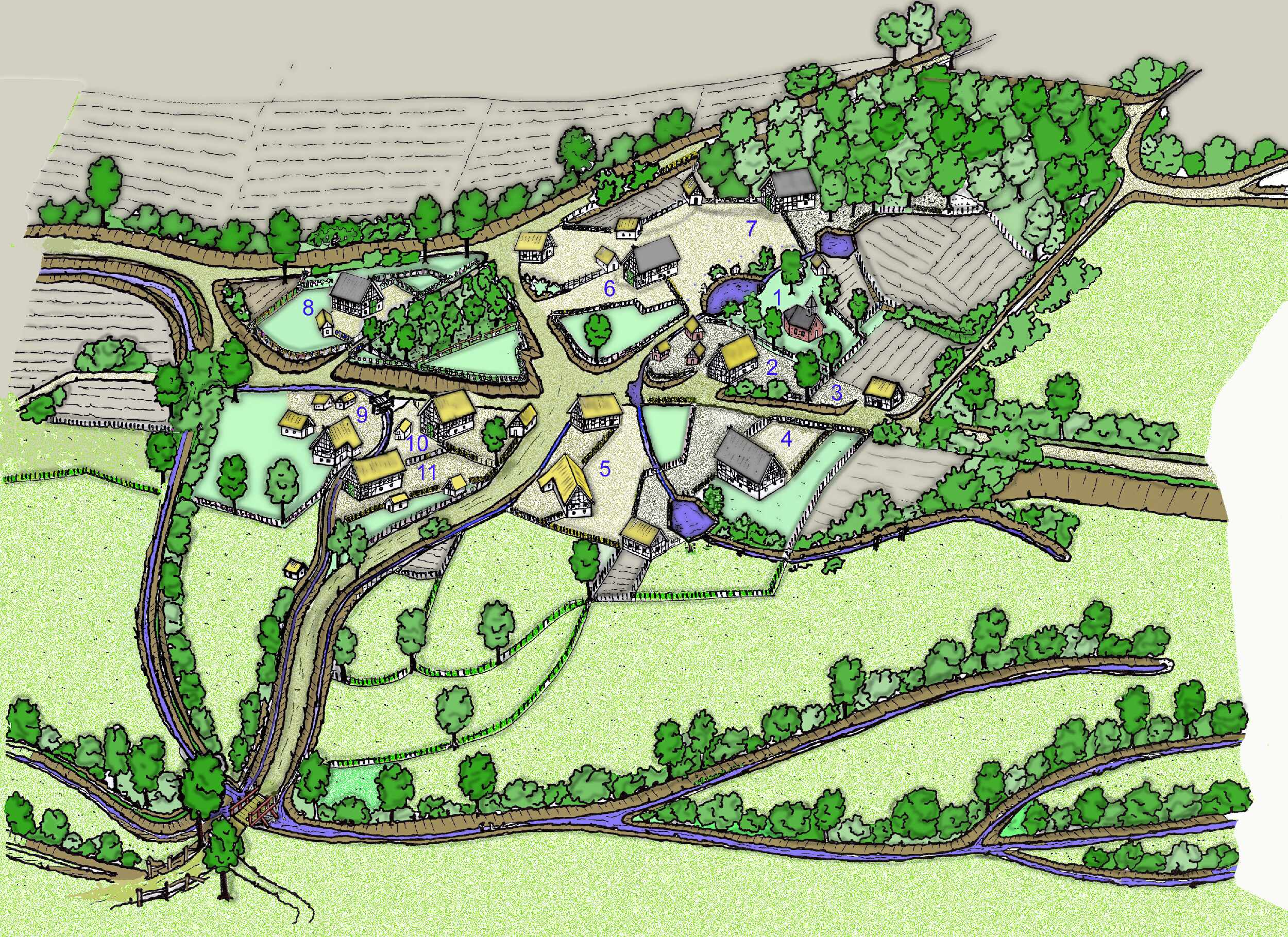 Rekonstruktion Werpe, Schmallenberg, nach dem Urkataster u. versch. topographische Karten